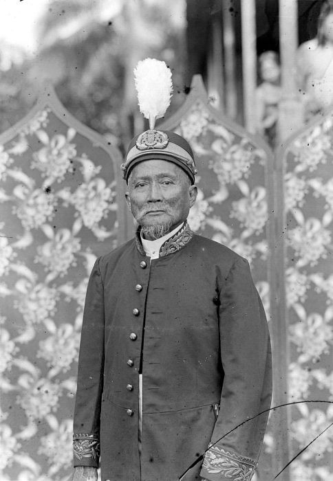 Negatief. Datoe Mansoei, eerste rijksgrote van Boeloengan, Borneo